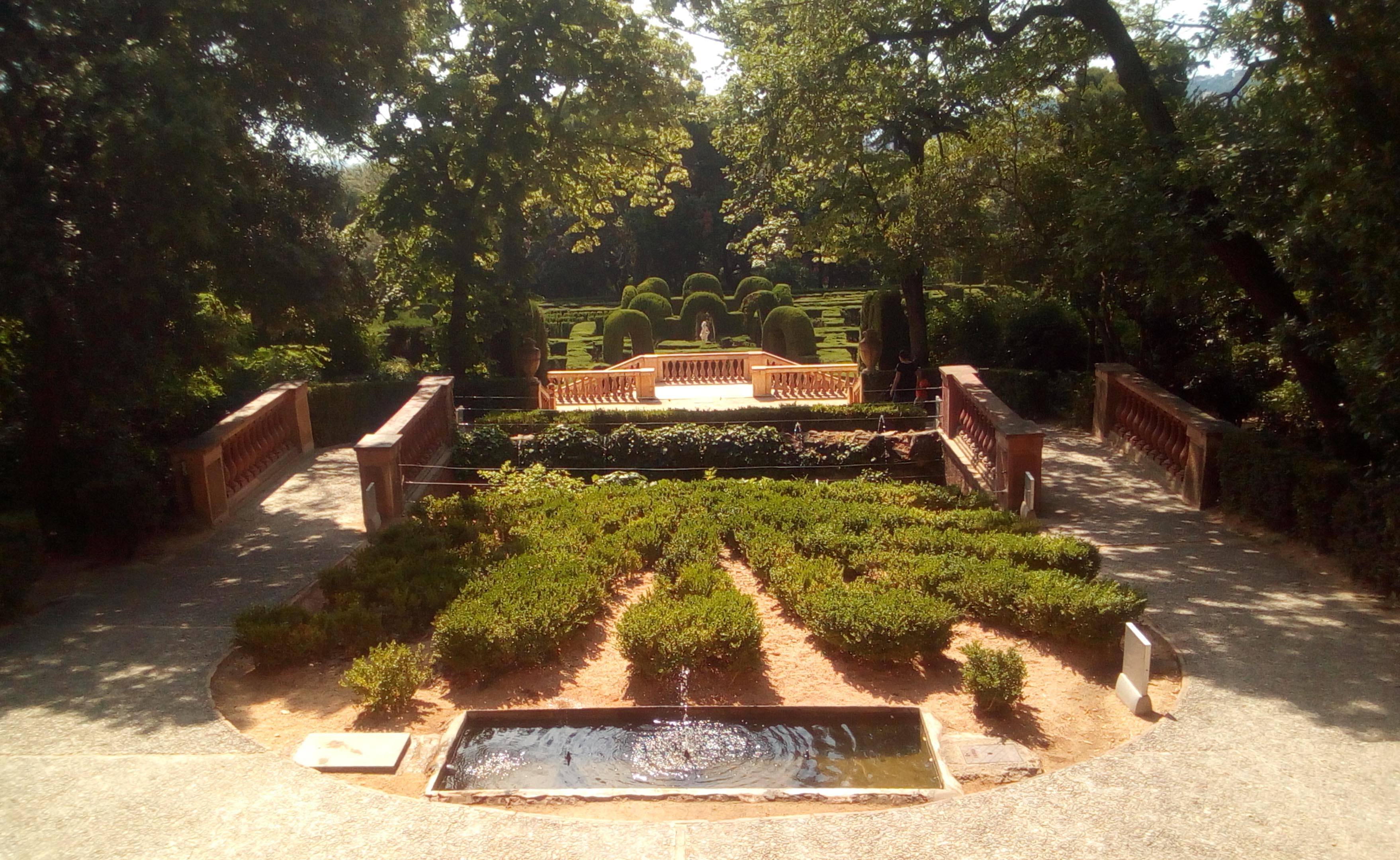 El laberinto visto desde el pabellón neoclásico.